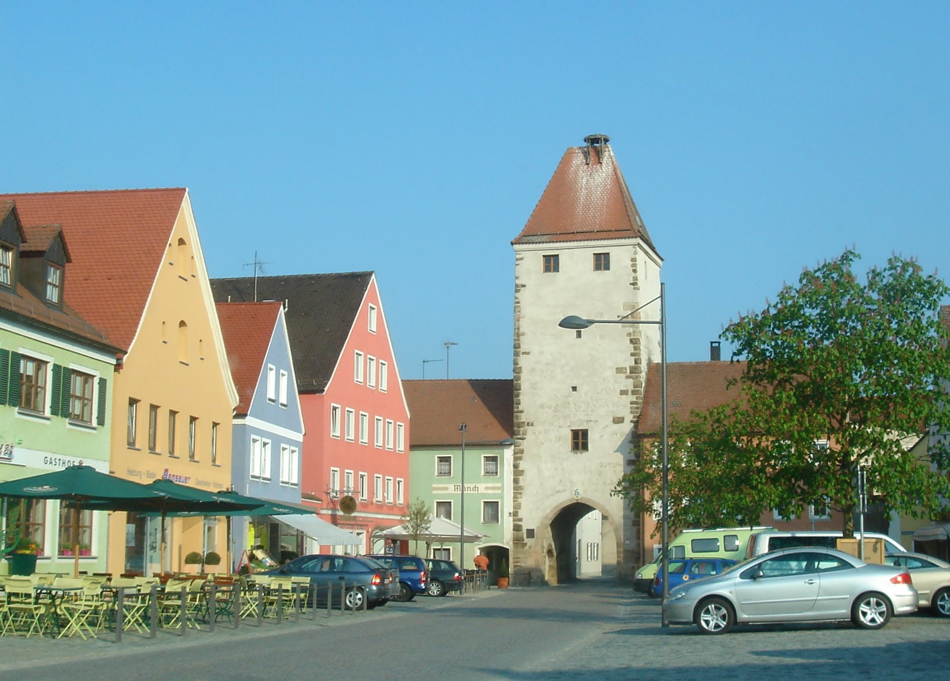 Oberer Turm und Marktplatz in Freystadt, Oberpfalz, Bayern.